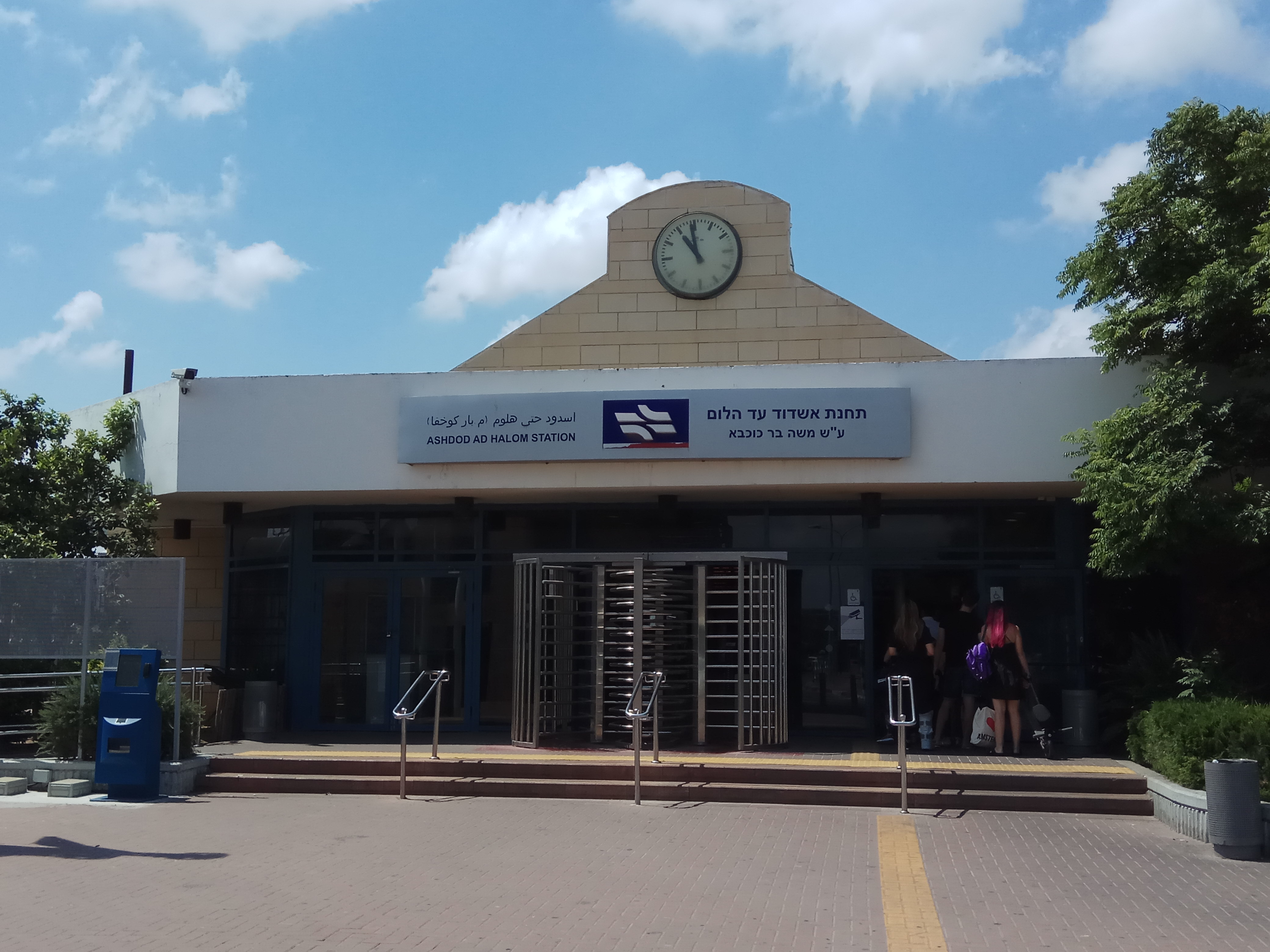 תחנת הרכבת אשדוד עד הלום על שם אלוף (מיל.) משה בר כוכבא